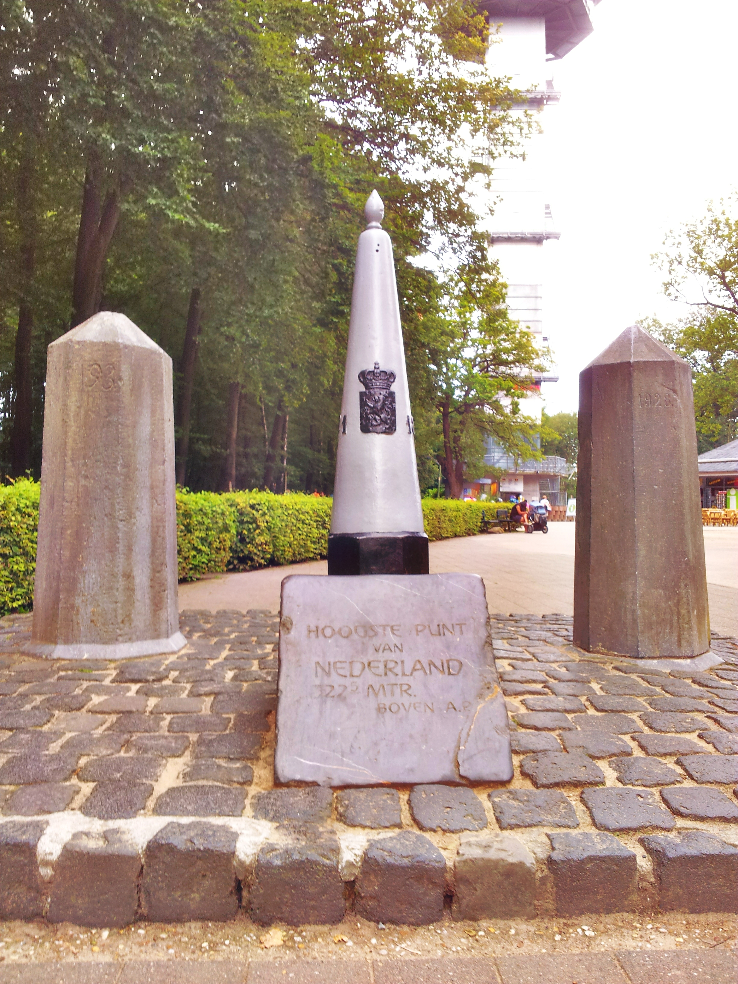 Drie landenpunt - Hoogste punt van Nederland